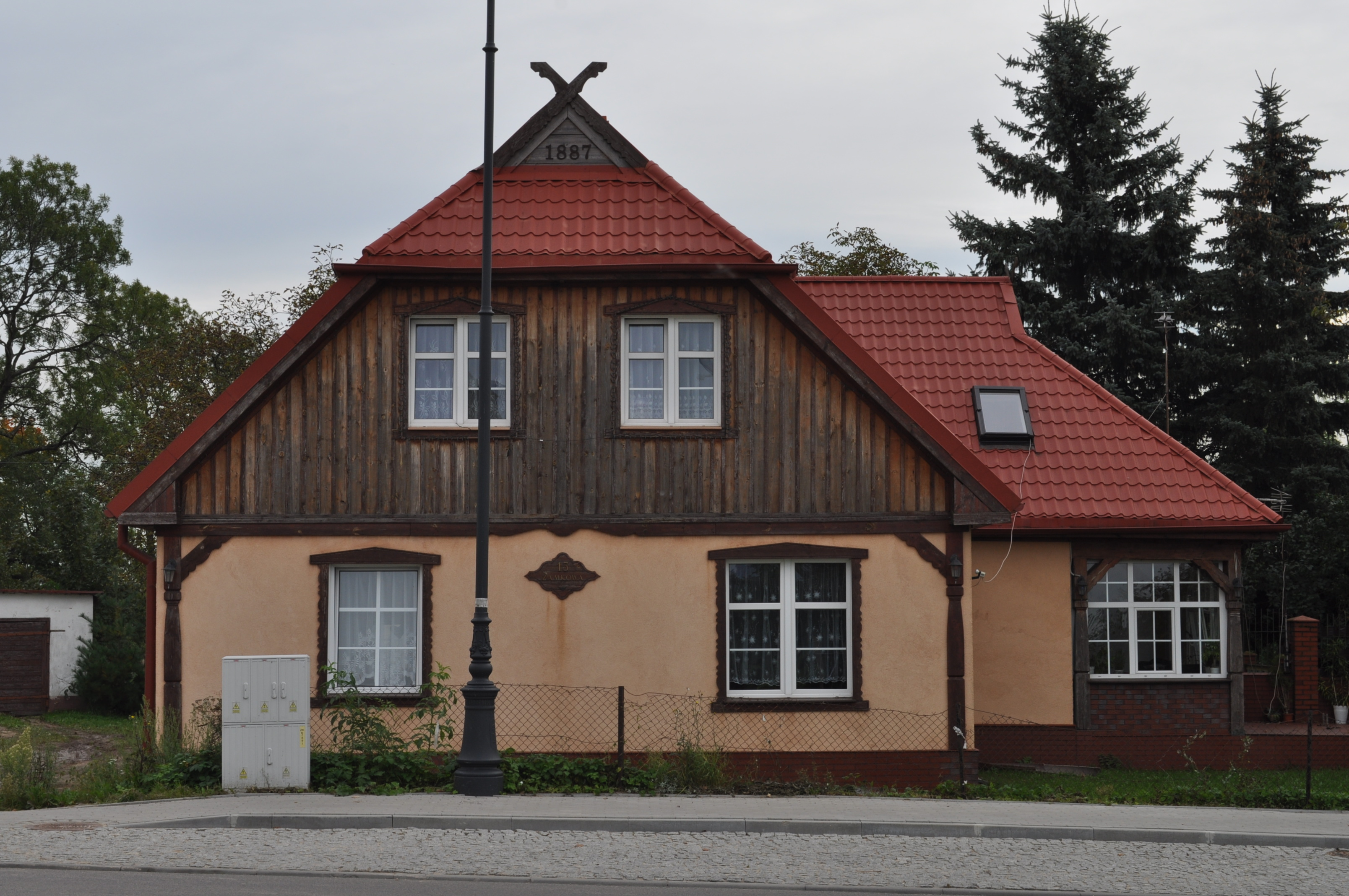 budynek mieszkalny